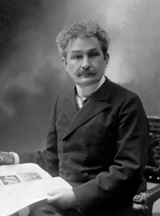 Leóš Janáček el 1904